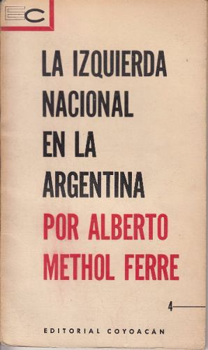 Tapa: La Izquierda Nacional en la Argentina y la otra: La luz en el túnel